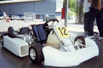 Mugen Playing kart 90 at Twin ring Motegi.